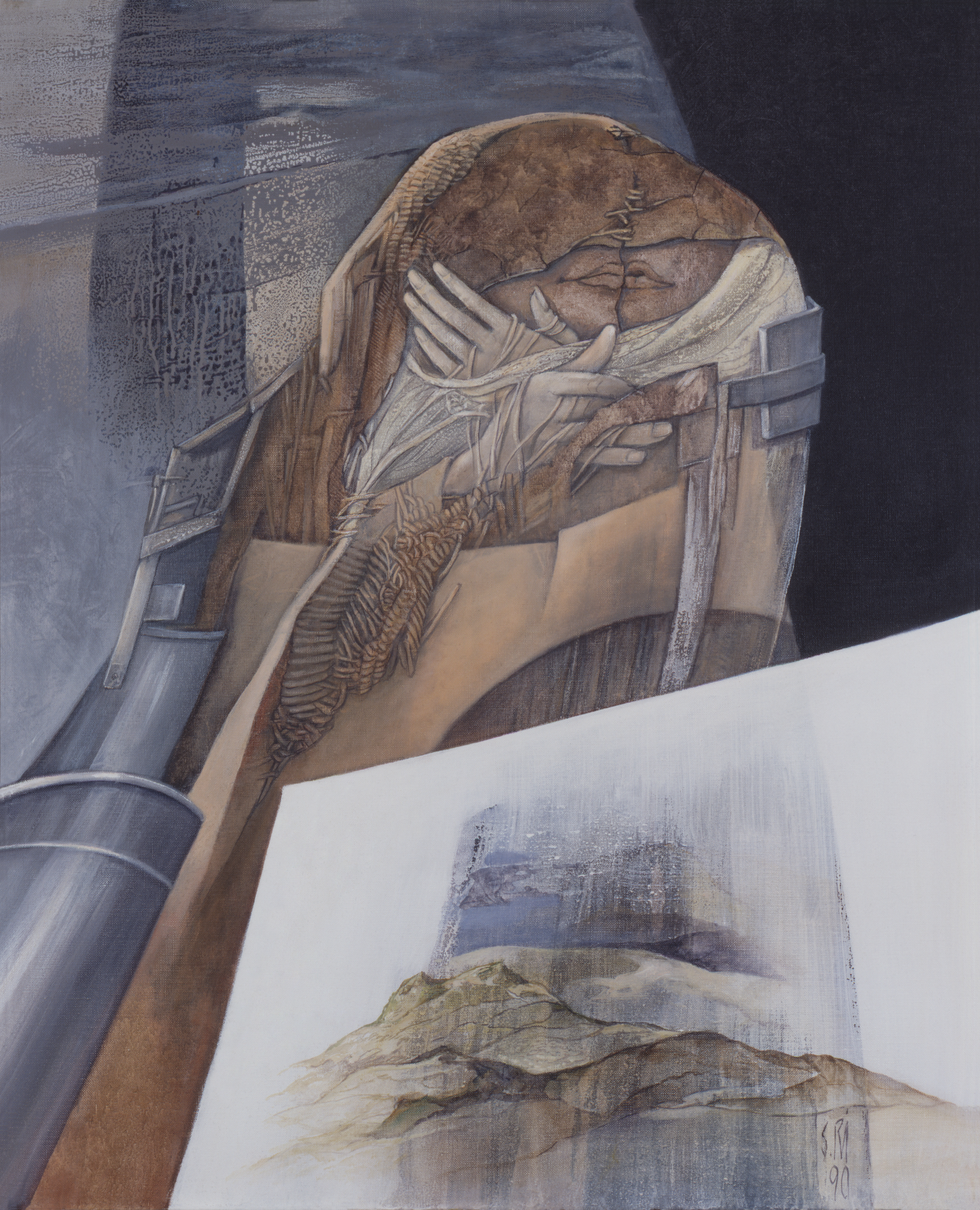 Phantastischer Realismus